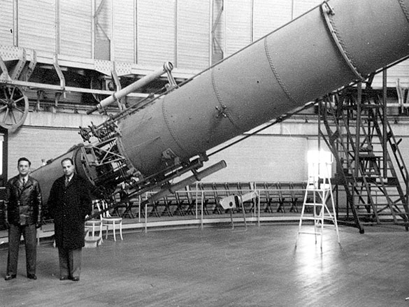 Jorge Sahade en 1944, trabajando en el Observatorio Yerkes de la Universidad de Chicago.